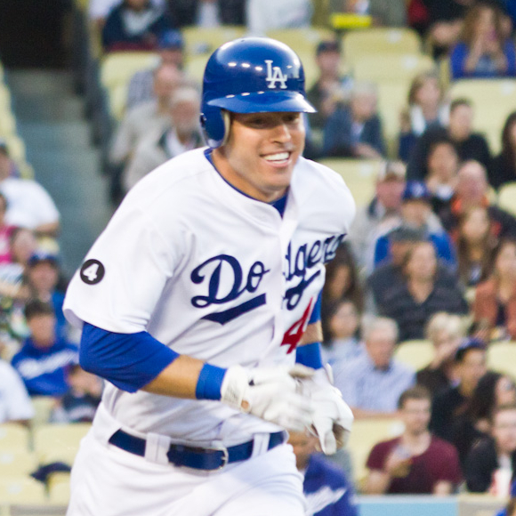 Trent Oeltjen